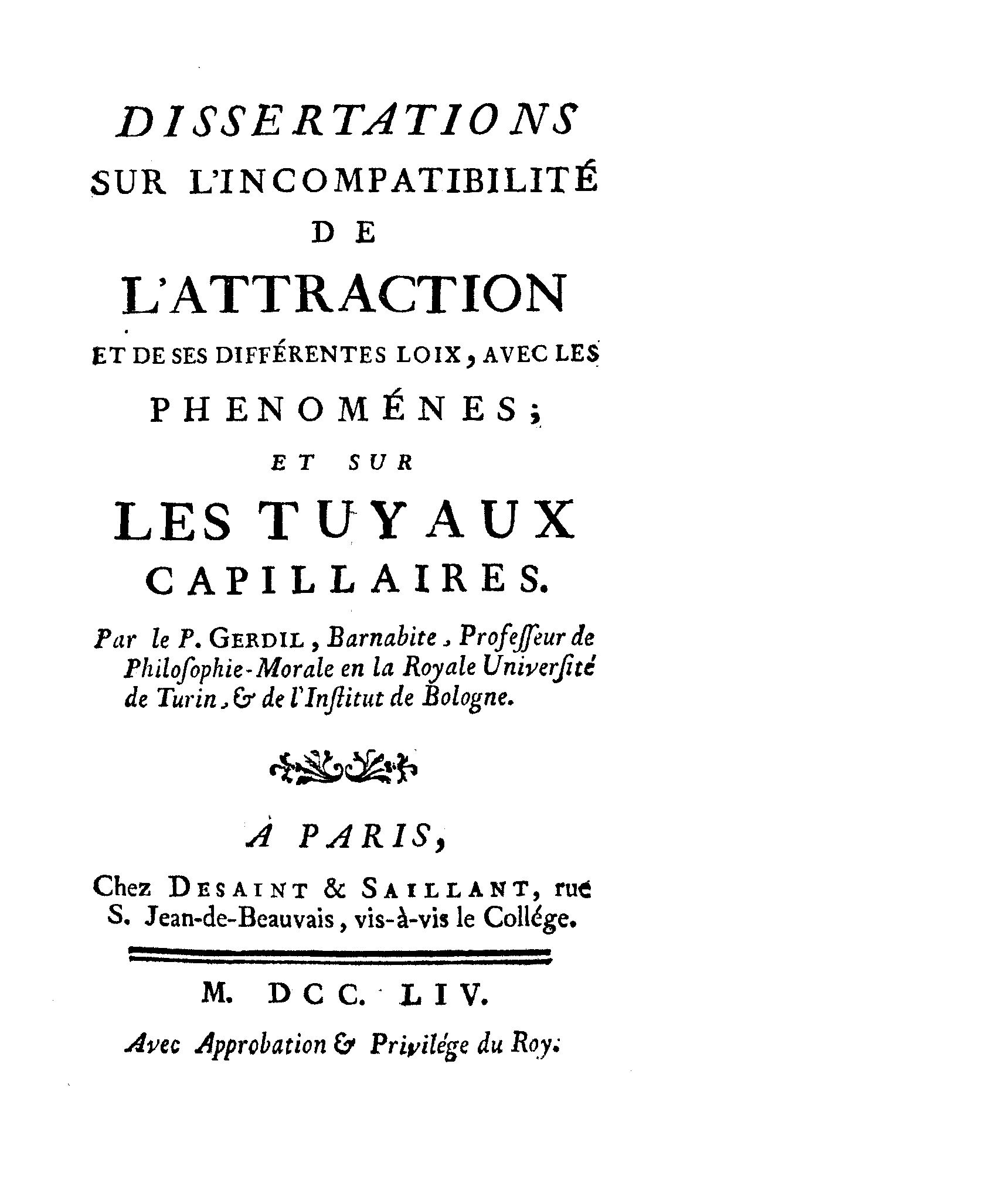 Dissertations sur l'incompatibilité de l'attraction et de ses différentes loix, avec les phenoménes; et sur les tuyaux capillaires. Par le p. Gerdil, barnabite, .... - A Paris : chez Desaint & Saillant, 1754. - XXIV, 391, [5] p., [1] c. di tav. ; 12º .